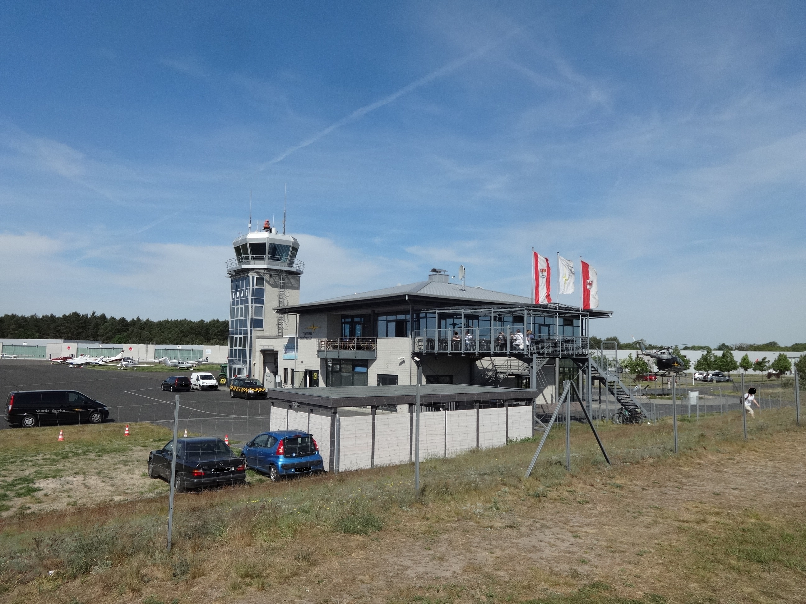 Hauptgebäude mit Restaurant und Tower des Flugplatzes Schönhagen bei Trebbin, Brandenburg